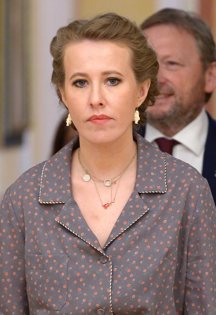 Кандидат от всероссийской политической партии «Гражданская инициатива» Ксения Собчак перед встречей с Владимиром Путиным